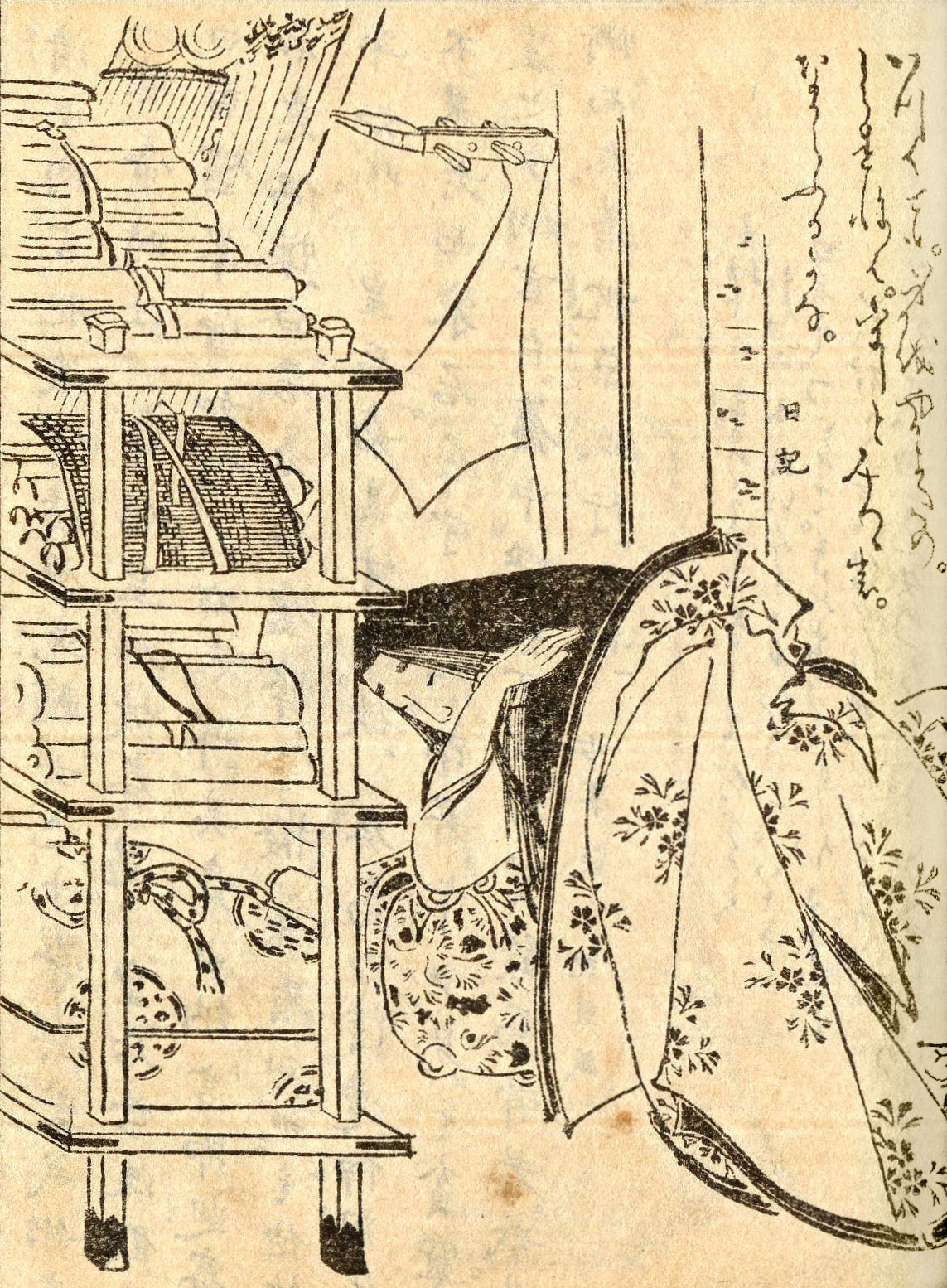 Murasaki Shikibu sleeping